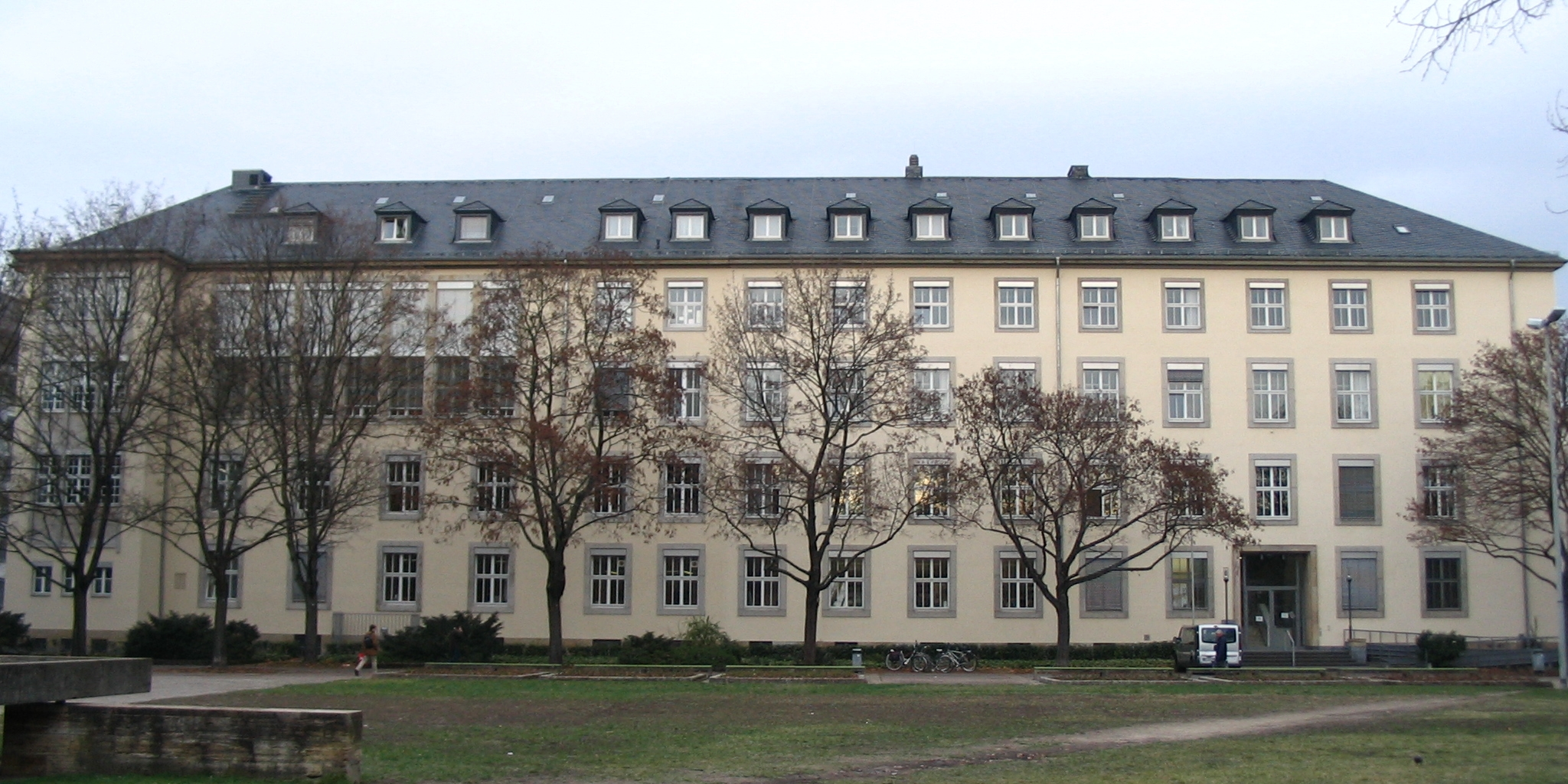 Das Gebäude des Landesarbeitsgerichts Rheinland-Pfalz am Ernst-Ludwig-Platz 1 in Mainz, in dem auch das Landessozialgerichts Rheinland-Pfalz und das Sozialgericht Mainz untergebracht sind.